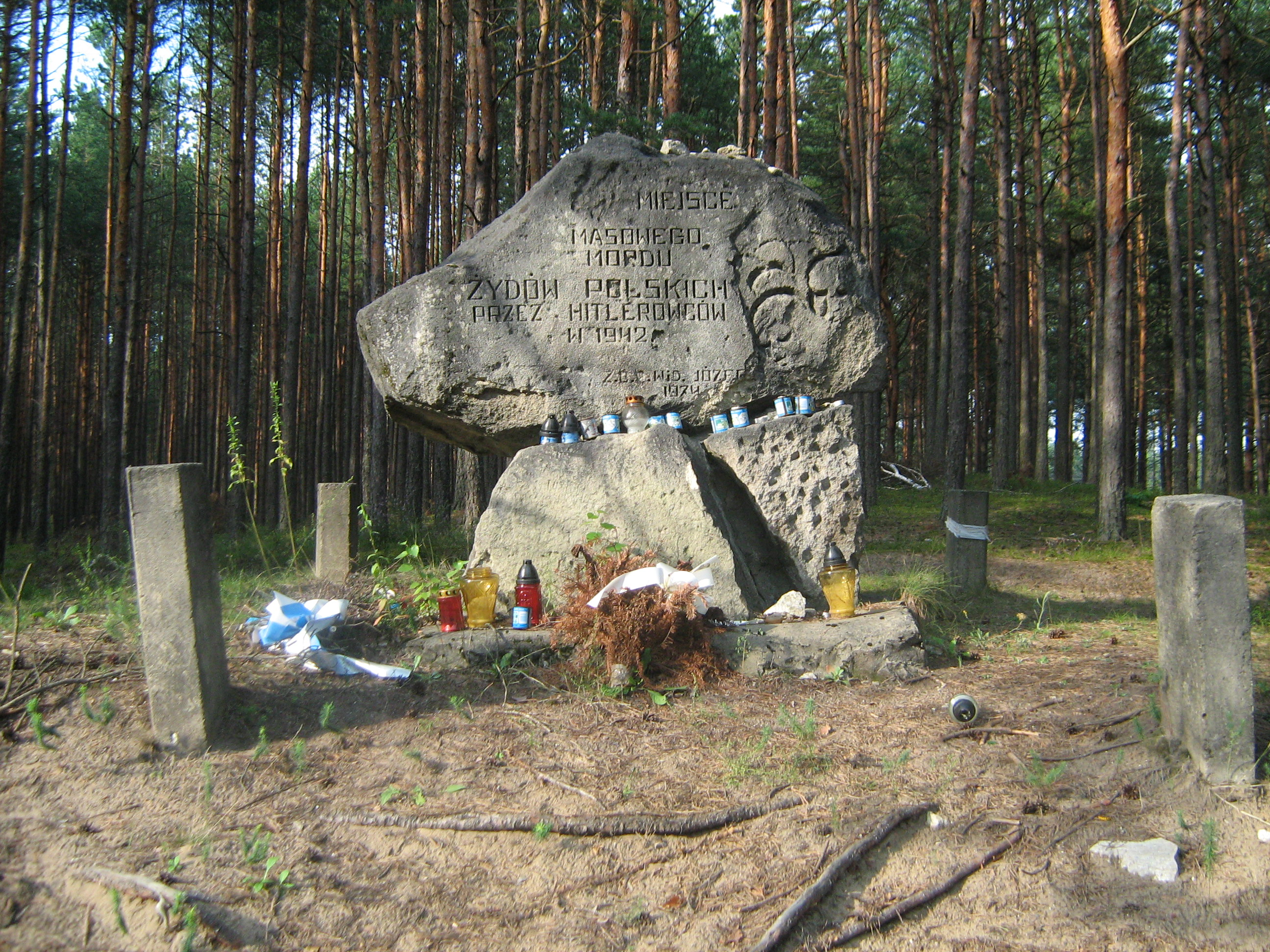 Obelisk w miejscu masowych egzekucji Żydów w Józefowie (pow. biłgorajski)